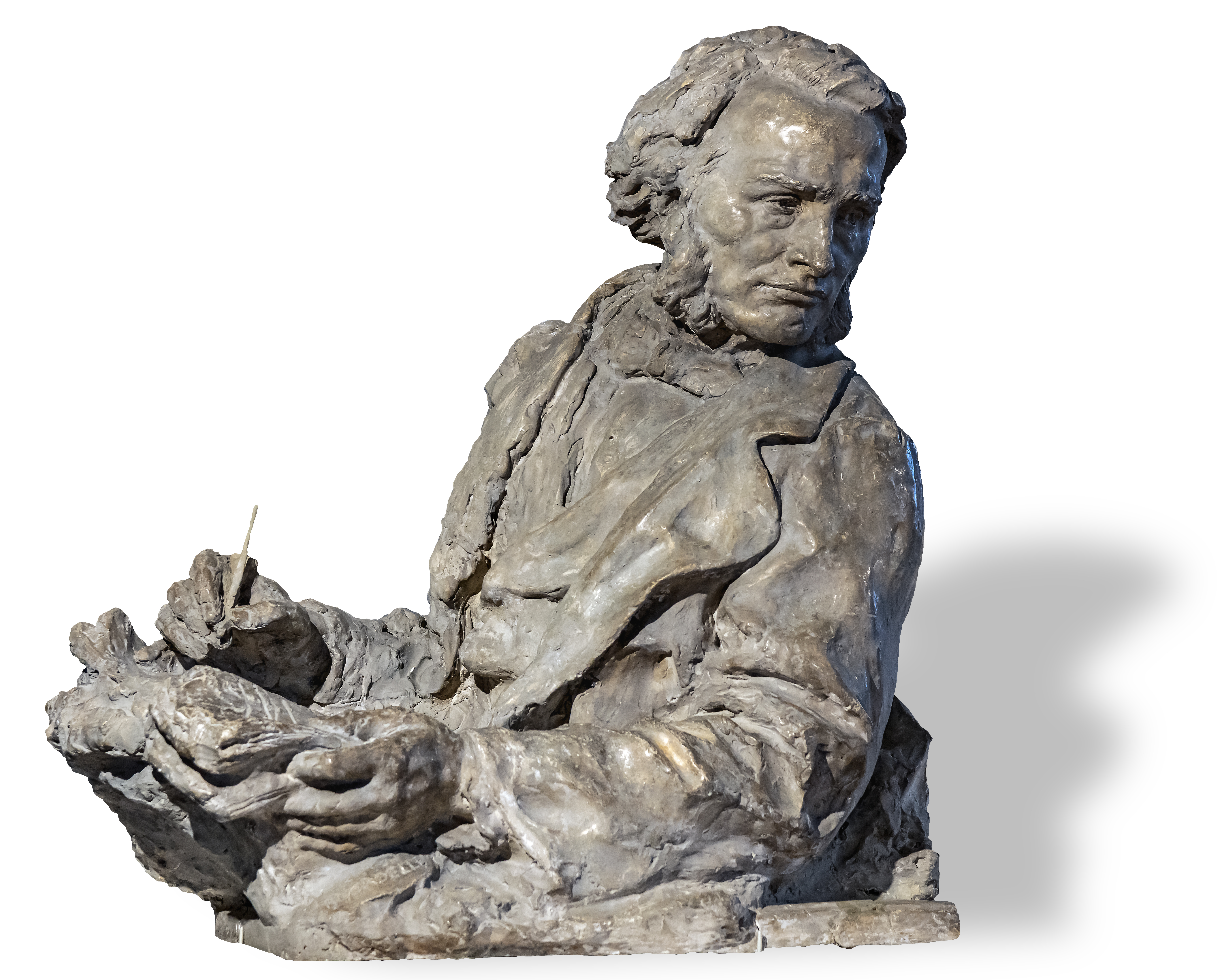 François Moulenq (1814-1892) fut secrétaire perpétuel de la société Archéologique du Tarn-et-Garonne.